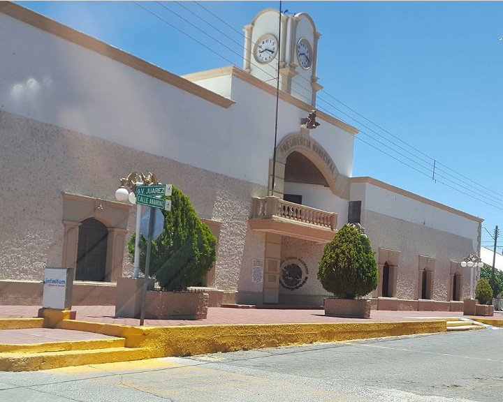 Presidencia Municipal, San Buenaventura, Chihuahua.